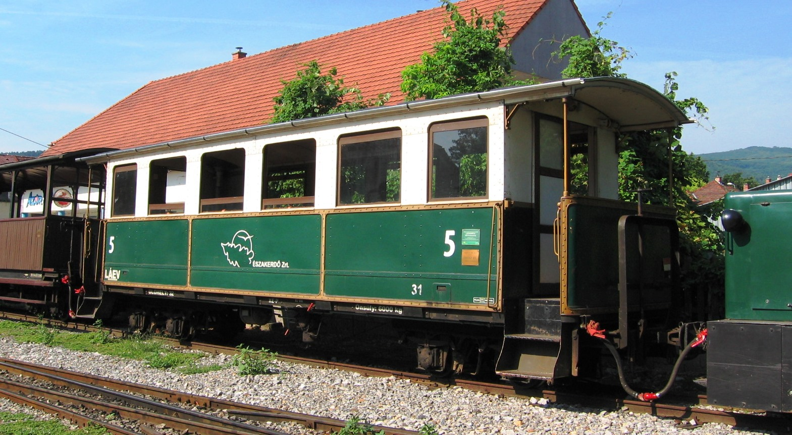 2015. 31-es személykocsi